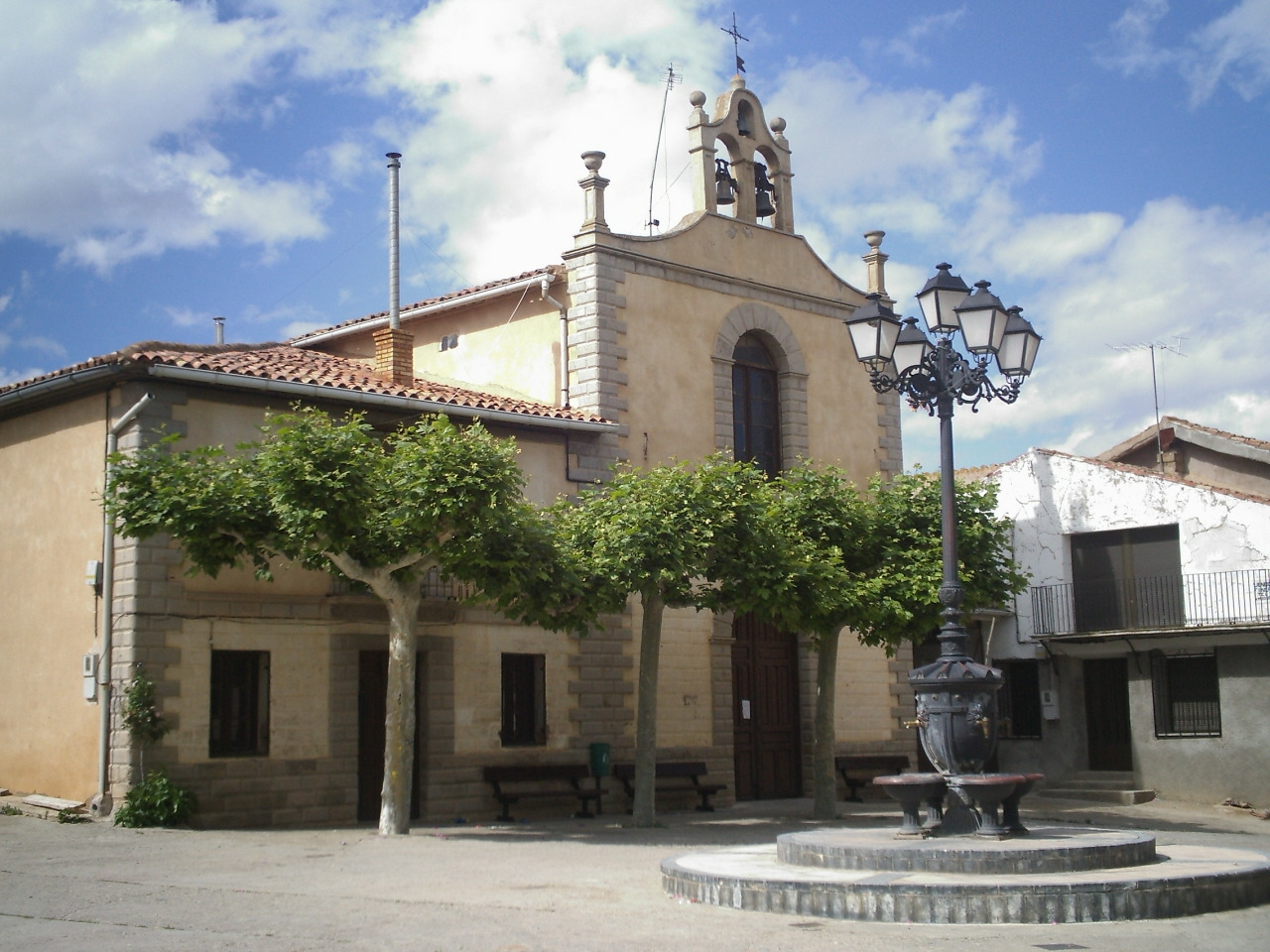 Cabretón - La Rioja (Spain)